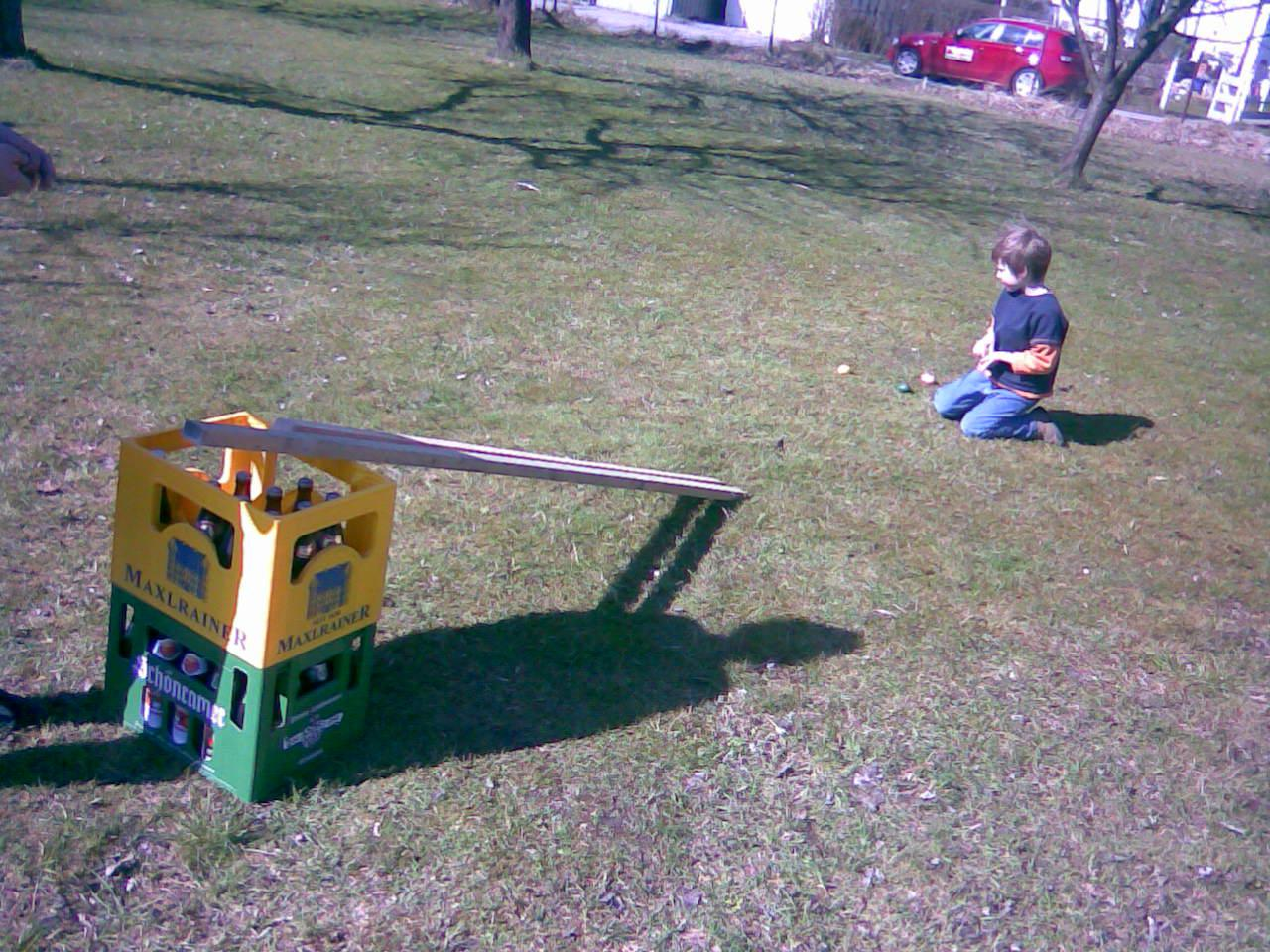 a Bua beim Oascheim